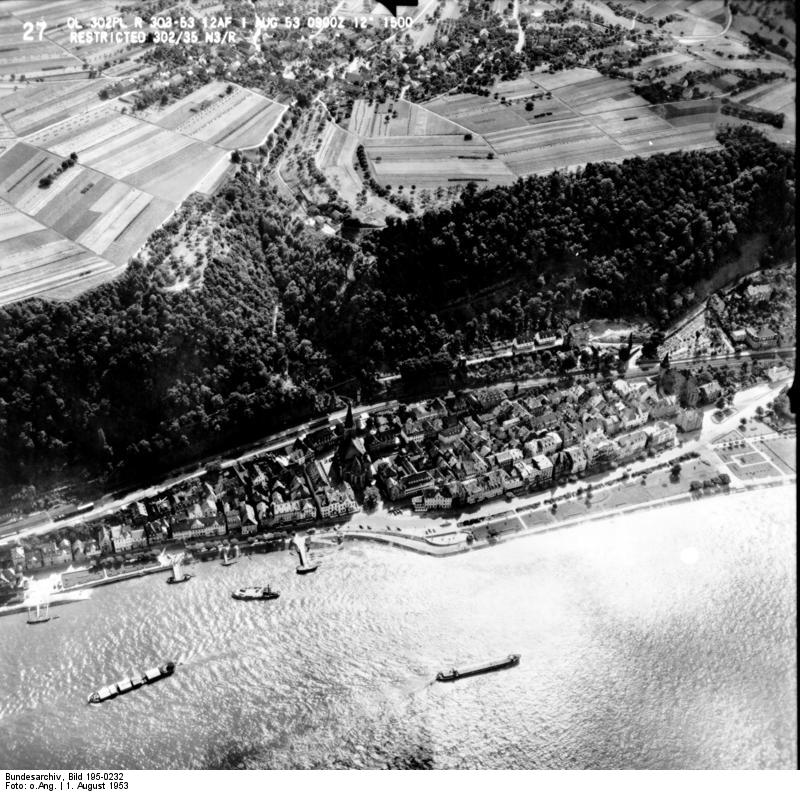 Rheinbefliegung der Alliierten 1953